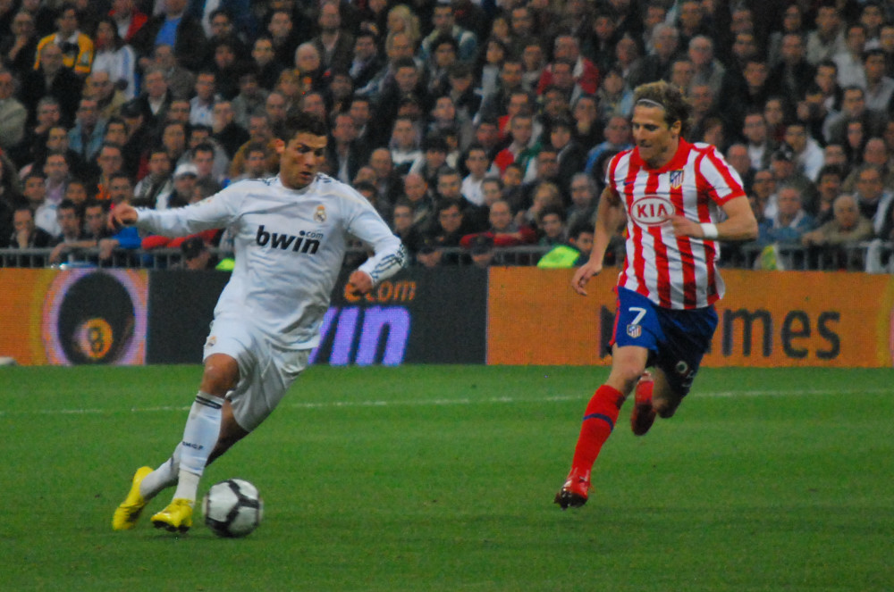 Cristiano Ronaldo y Forlán, enfrentados en un derby.